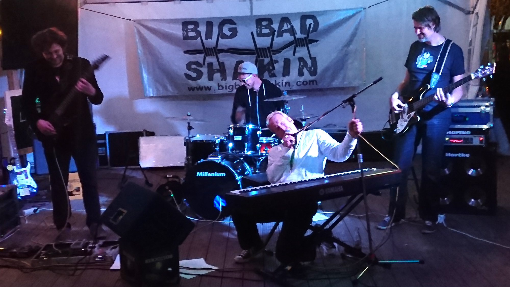 Live in Zingst an der Ostsee am 27. August 2016